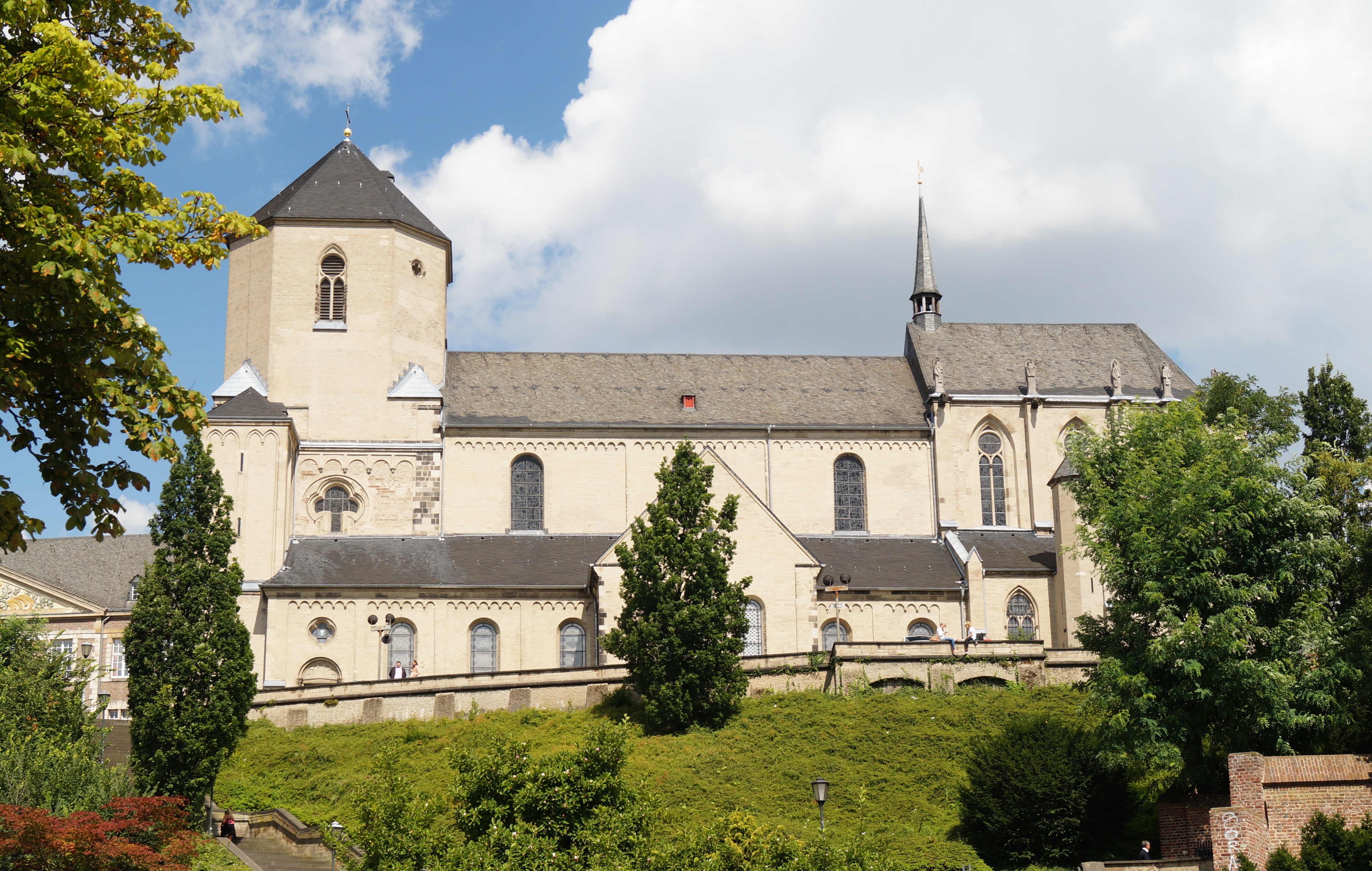 Südansicht